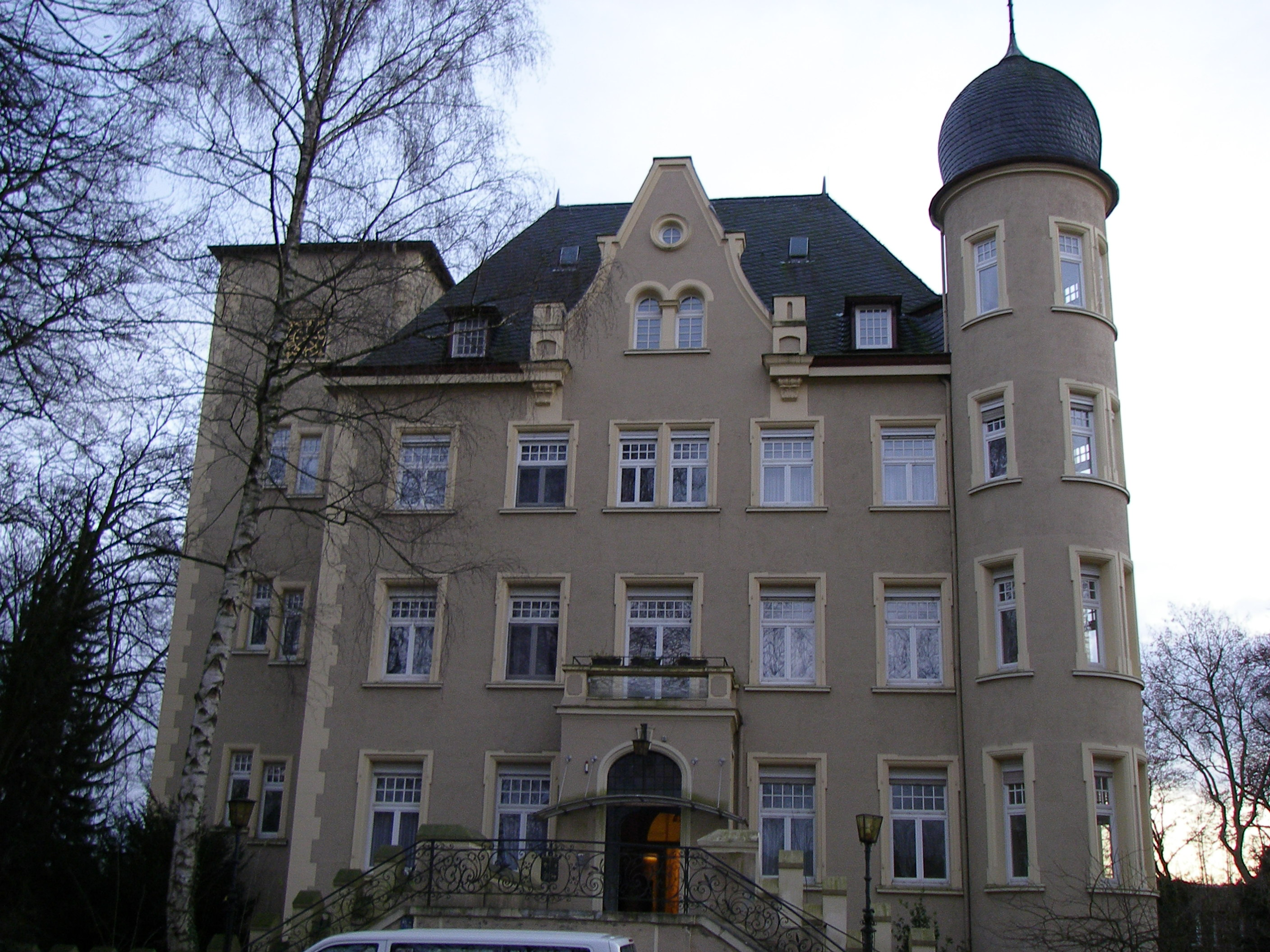 Haus Broich, Willich, Deutschland